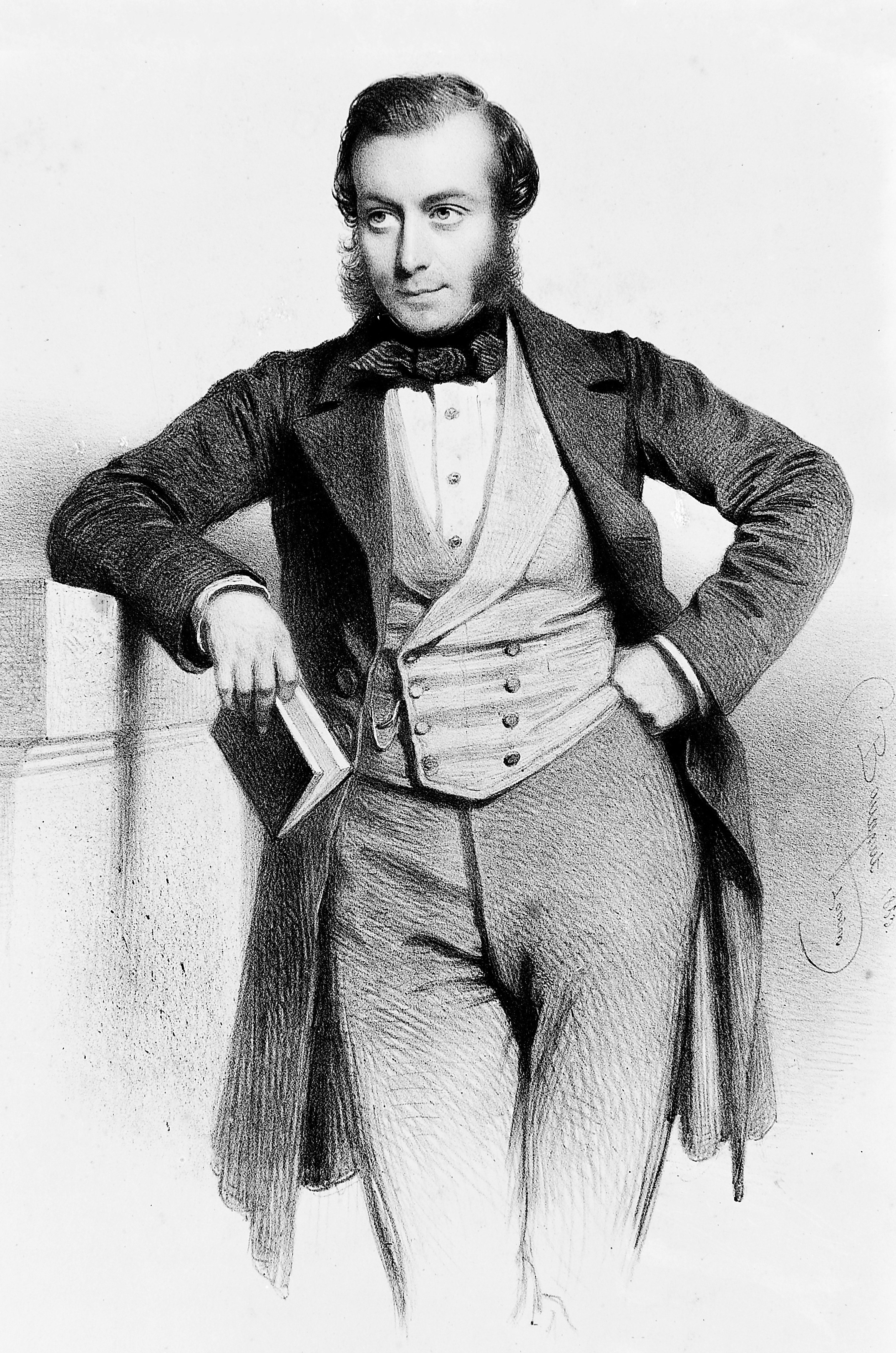 John Eric Erichsen